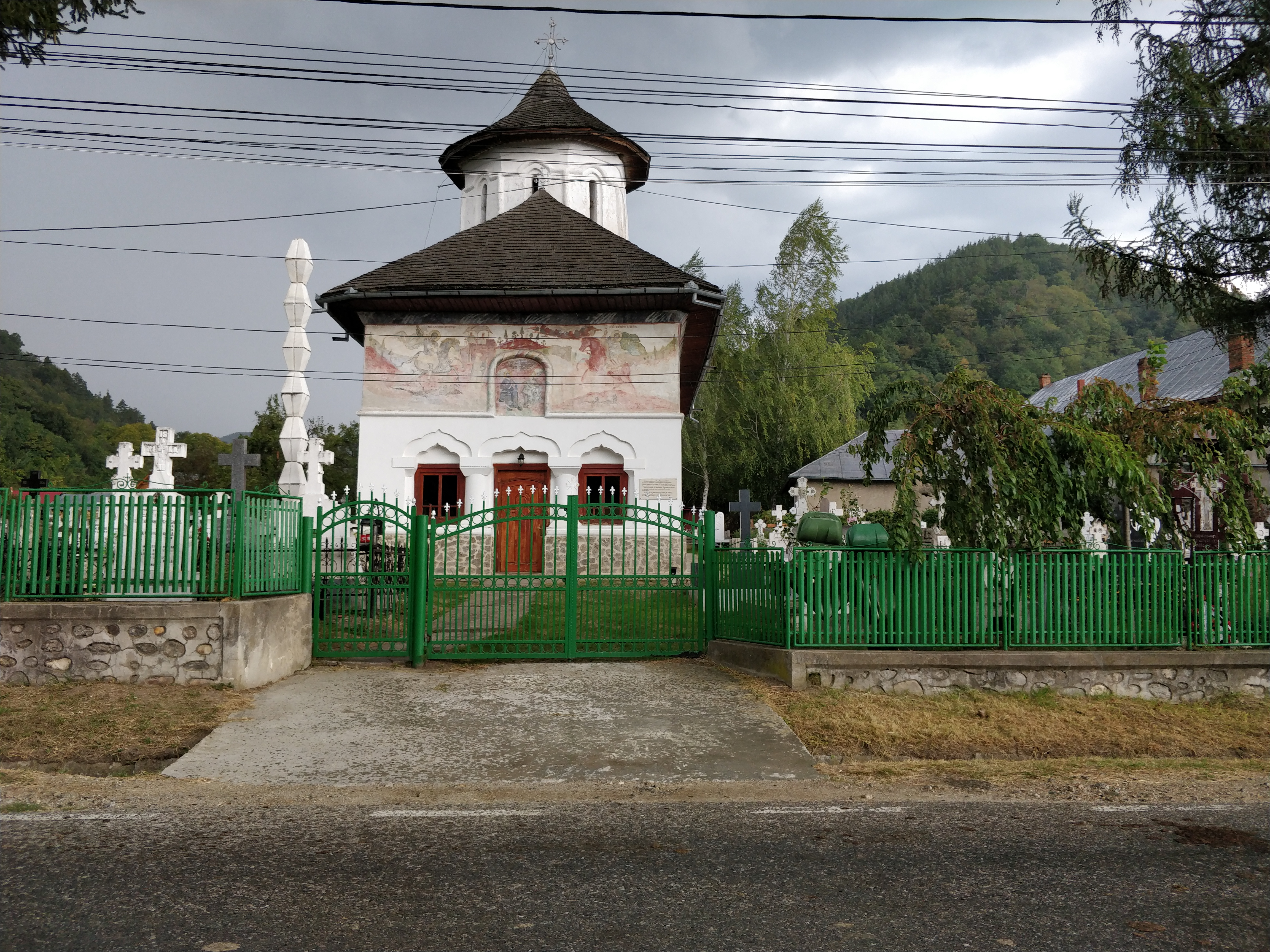 Biserica „Sf. Treime”